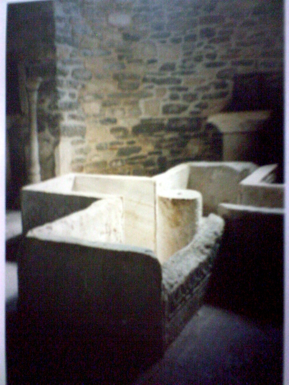 Baptisterio (siglo IV), Panaghia Ekatontopiliani, Paros, Cícladas, Grecia.